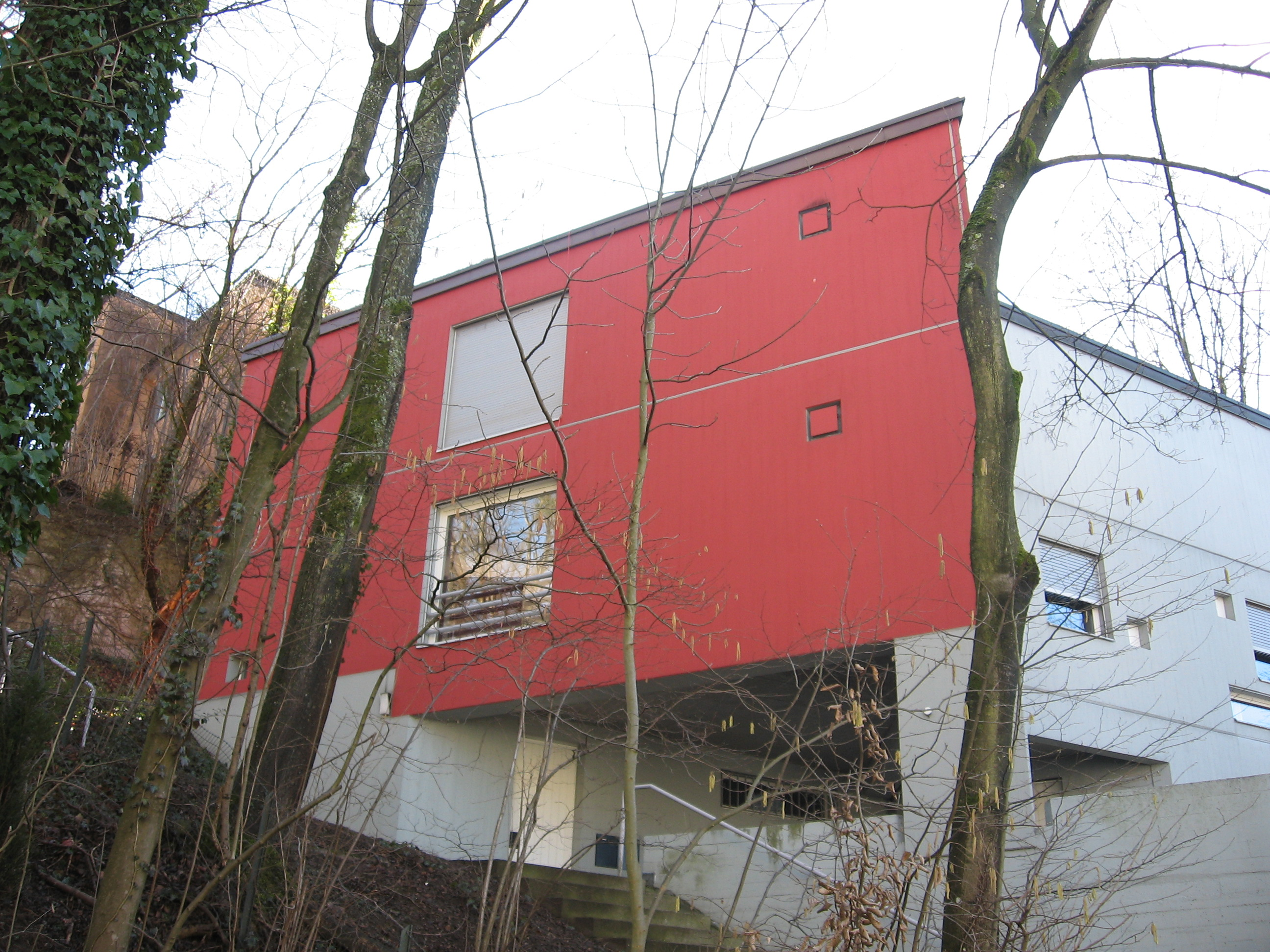 Trigondorf (Trigon-Village), Heuelstrasse, Zurich (Architect: Justus Dahinden, Zurich 1969)